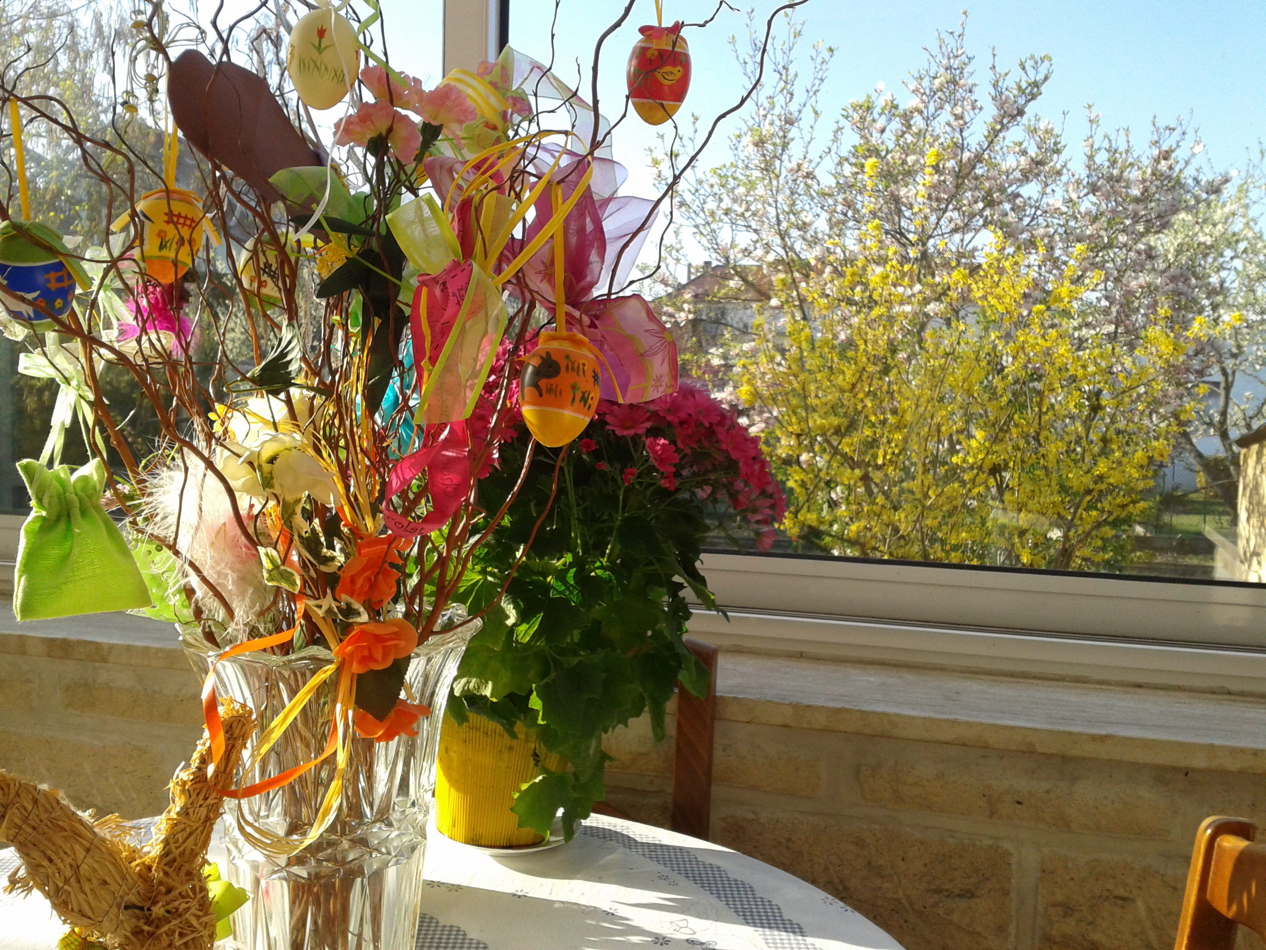 Bouquet floral de pâques traditionnel alsacien.